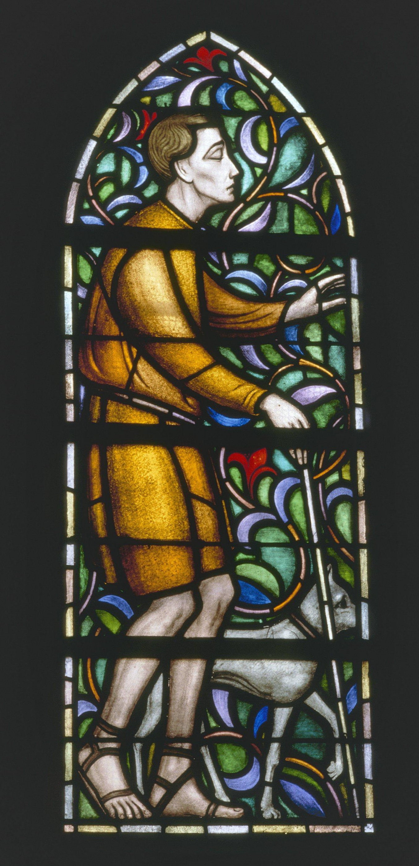 Rooms-Katholieke Onze-Lieve-Vrouwe Van Lourdeskerk: Interieur, aanzicht gebrandschilderd glas-in-loodraam (opmerking: Gefotografeerd voor Glas in lood in Nederland 1817-1968)